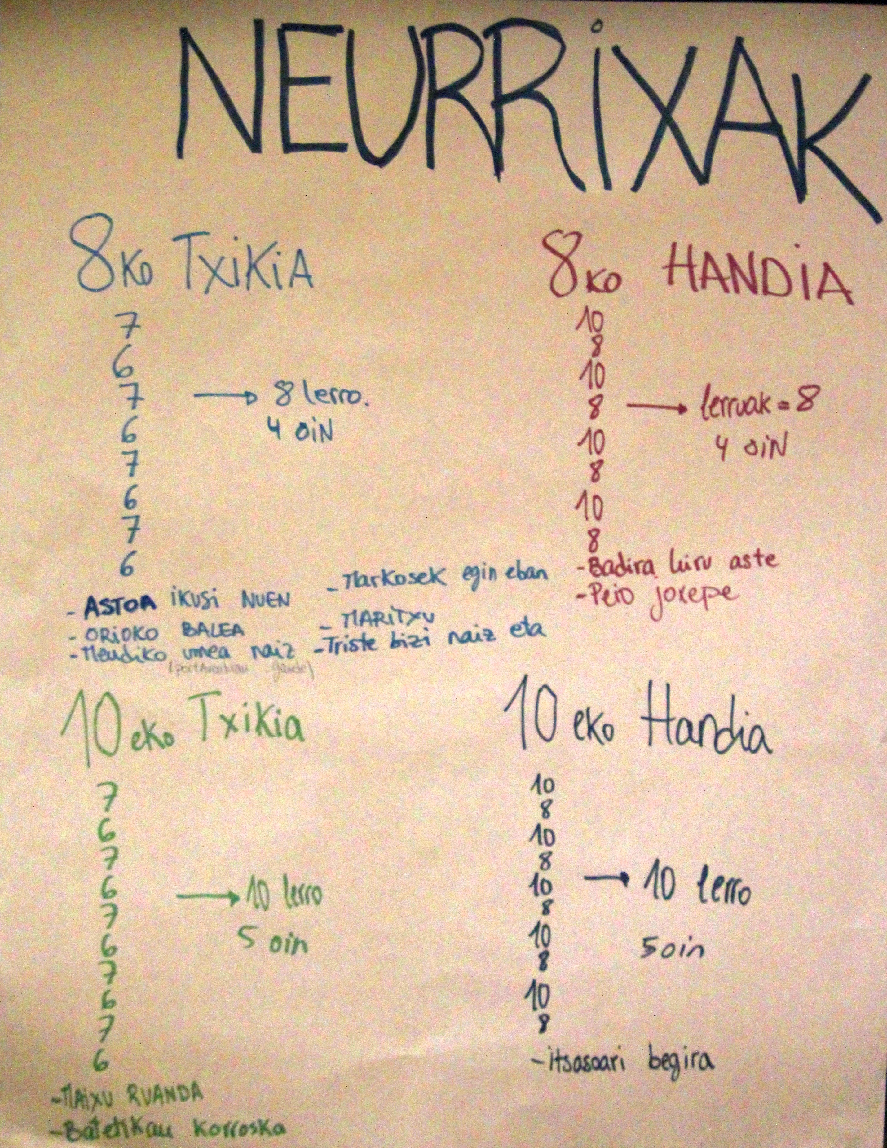 Bertsoaren Neurriak Egilea: Julen Bellan